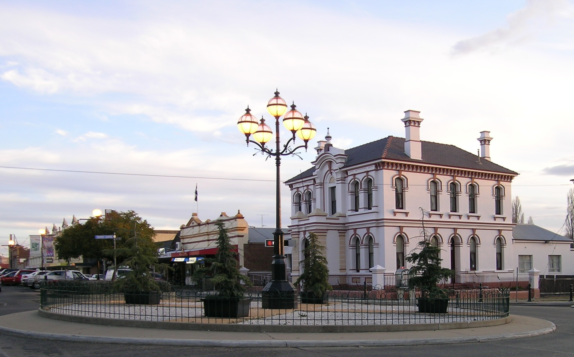 NAB Bank, Grey Street, Glen Innes NSW